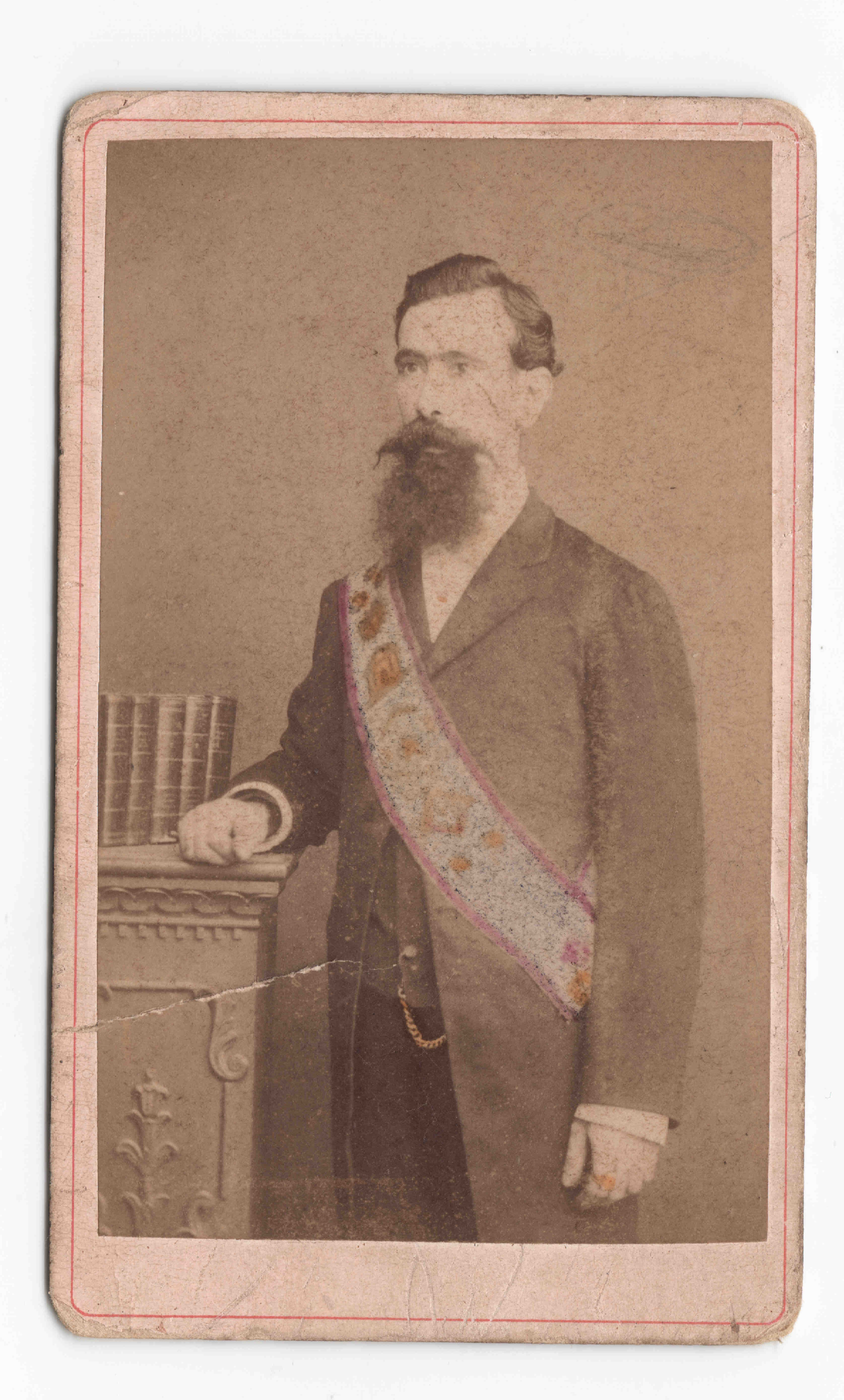 Fotografia do Carlos Pareta y Padrós